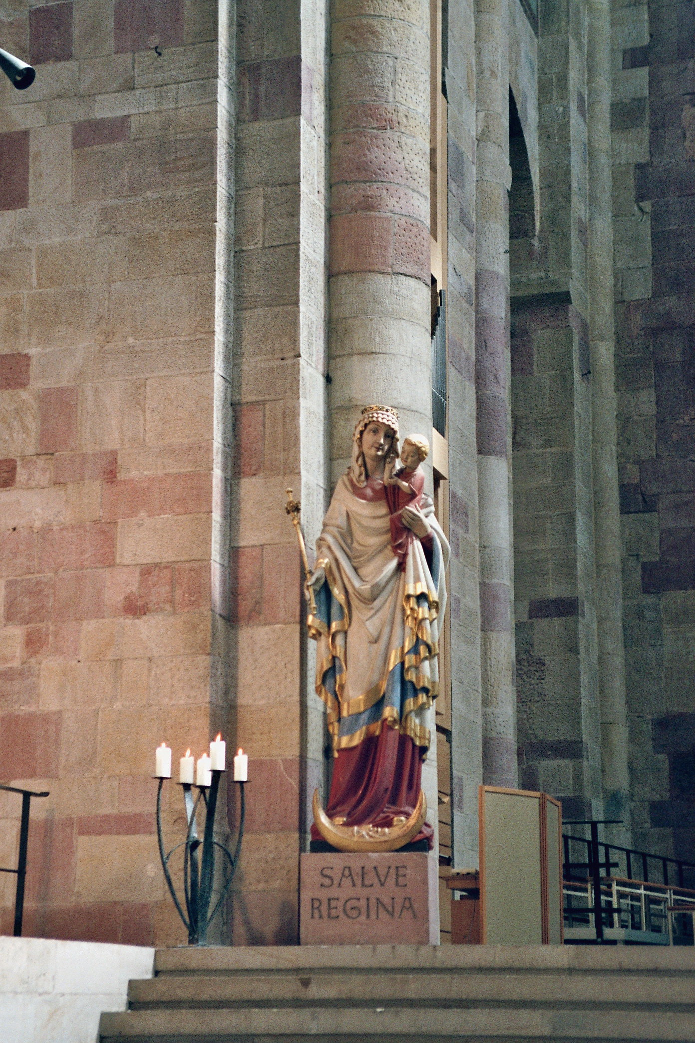 Salve Regina, Marienstatue im Dom von Speyer Bildhauer: August Weckbecker